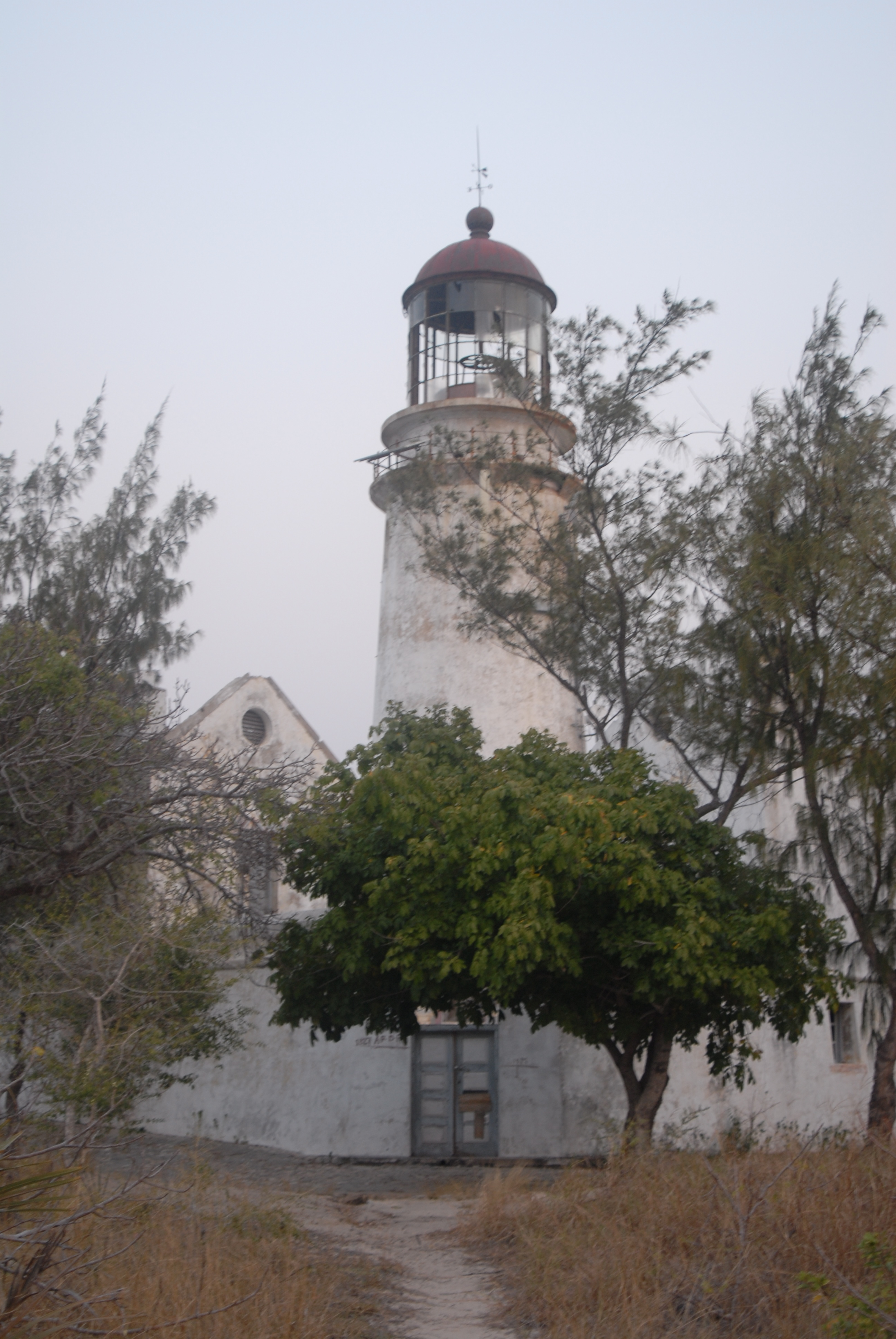 Bazaruto lighthouse, Mozambique